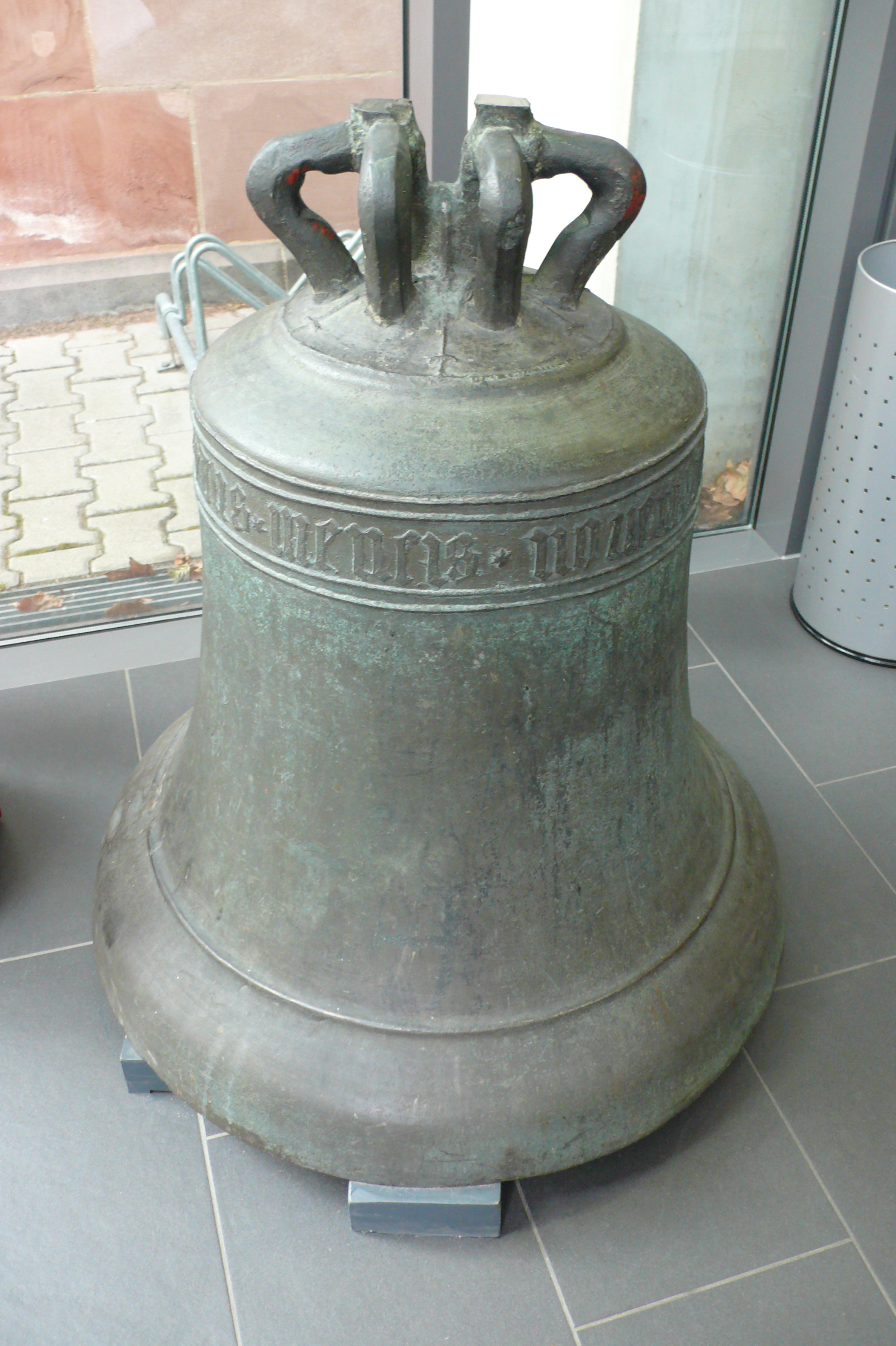 Evangelische Melanchthonkirche in Frankfurt-Fechenheim, barocke Kirche von 1772, historische Glocke